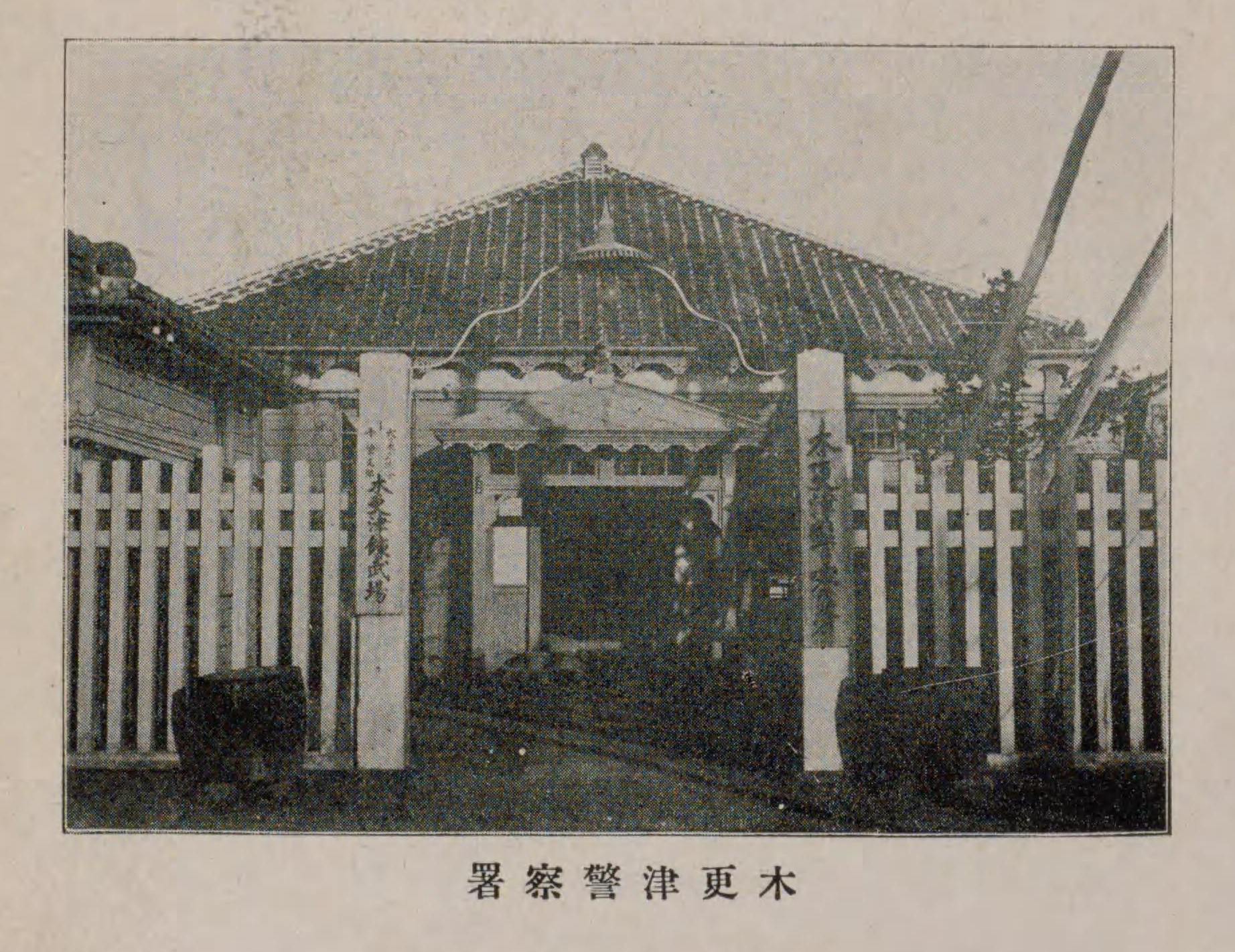 千葉県君津郡誌. 下巻（千葉県君津郡教育会 編、君津郡教育会 出版）木更津村仲町の寺院の一室を借用した当時の木更津警察署